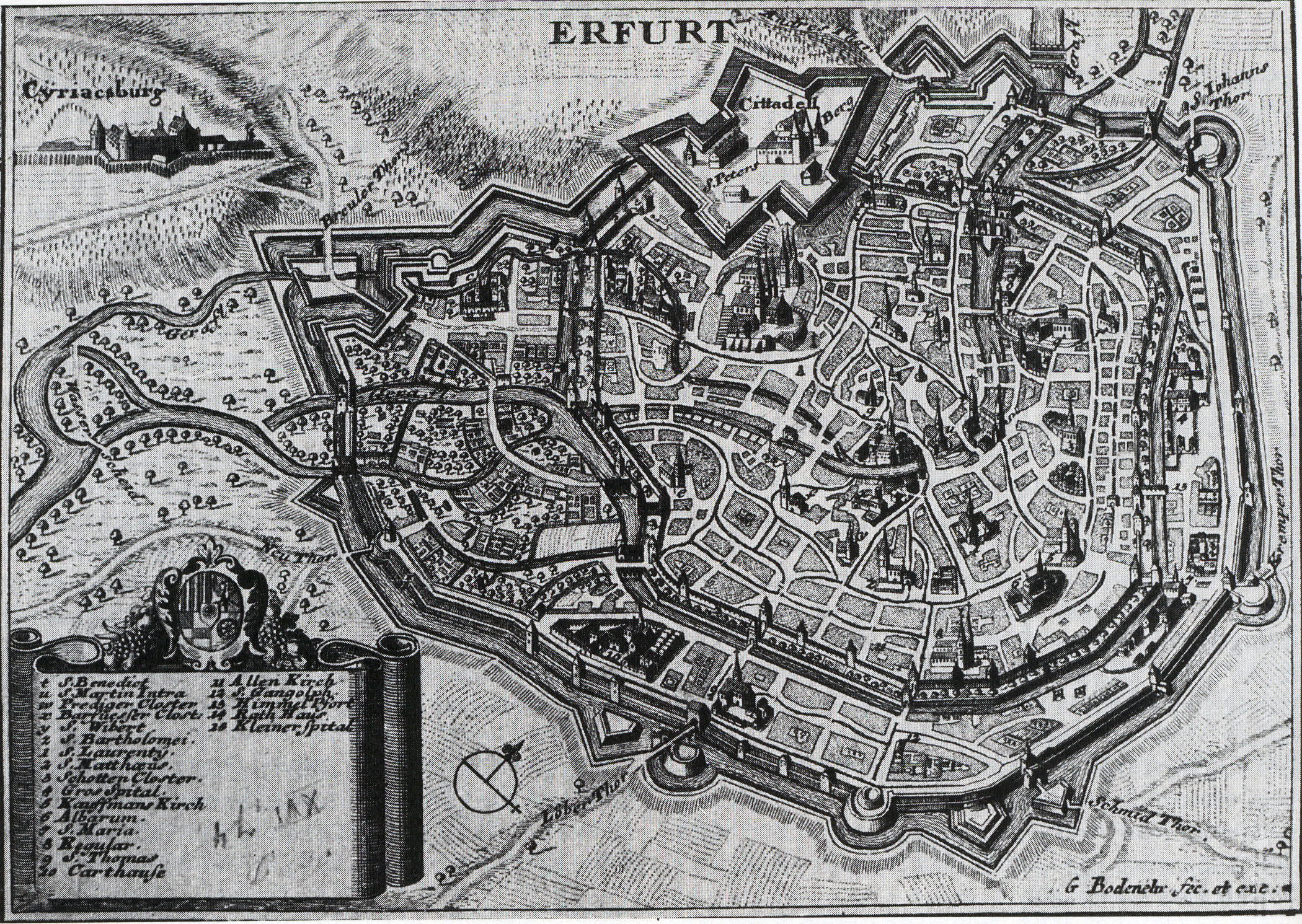 Ansicht der Stadt Erfurt mit der Zitadelle Petersberg um 1730